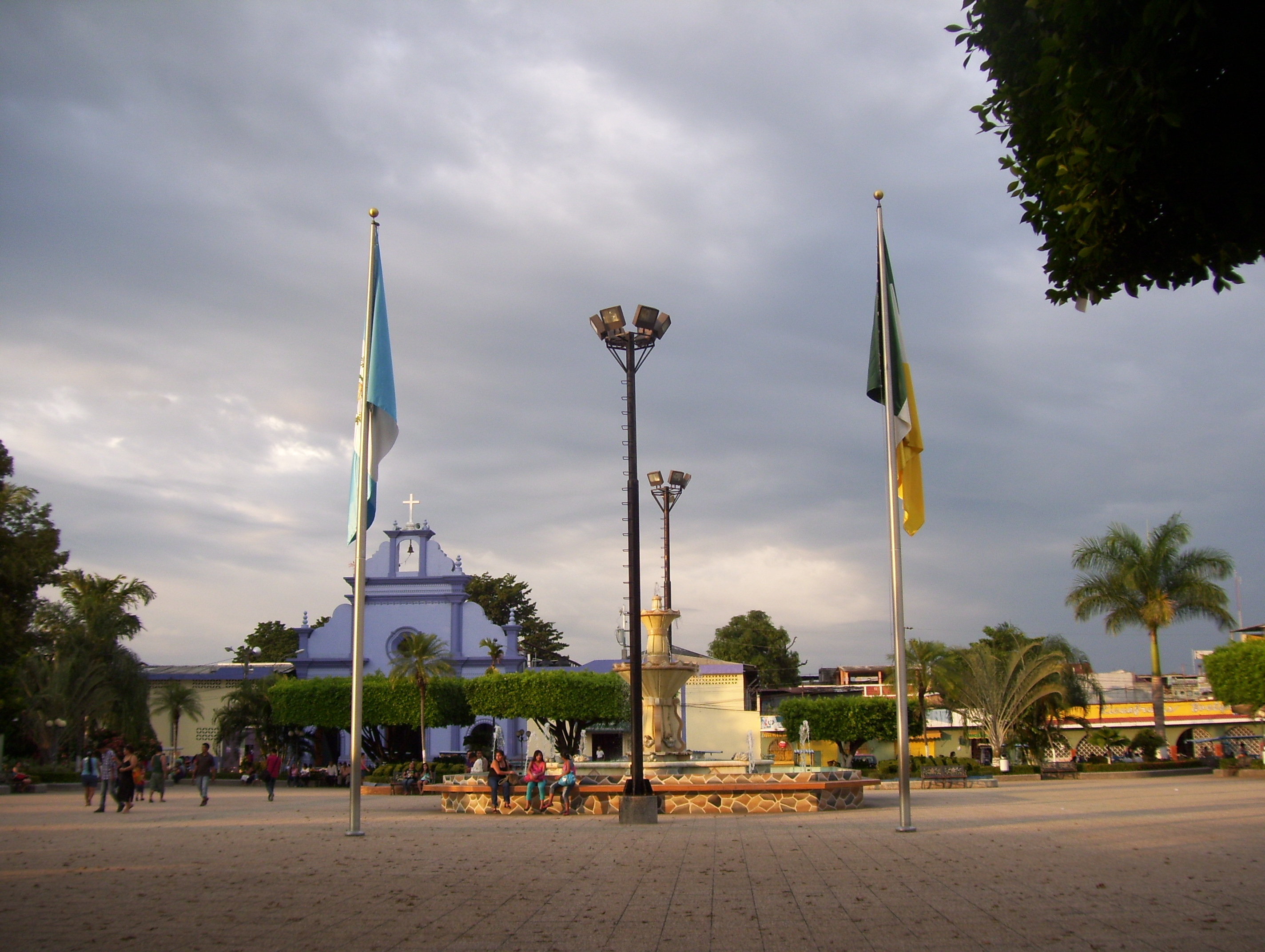 Ciudad fronteriza de Tecún Umán, frontera con México (Ciudad Hidalgo (Chiapas))